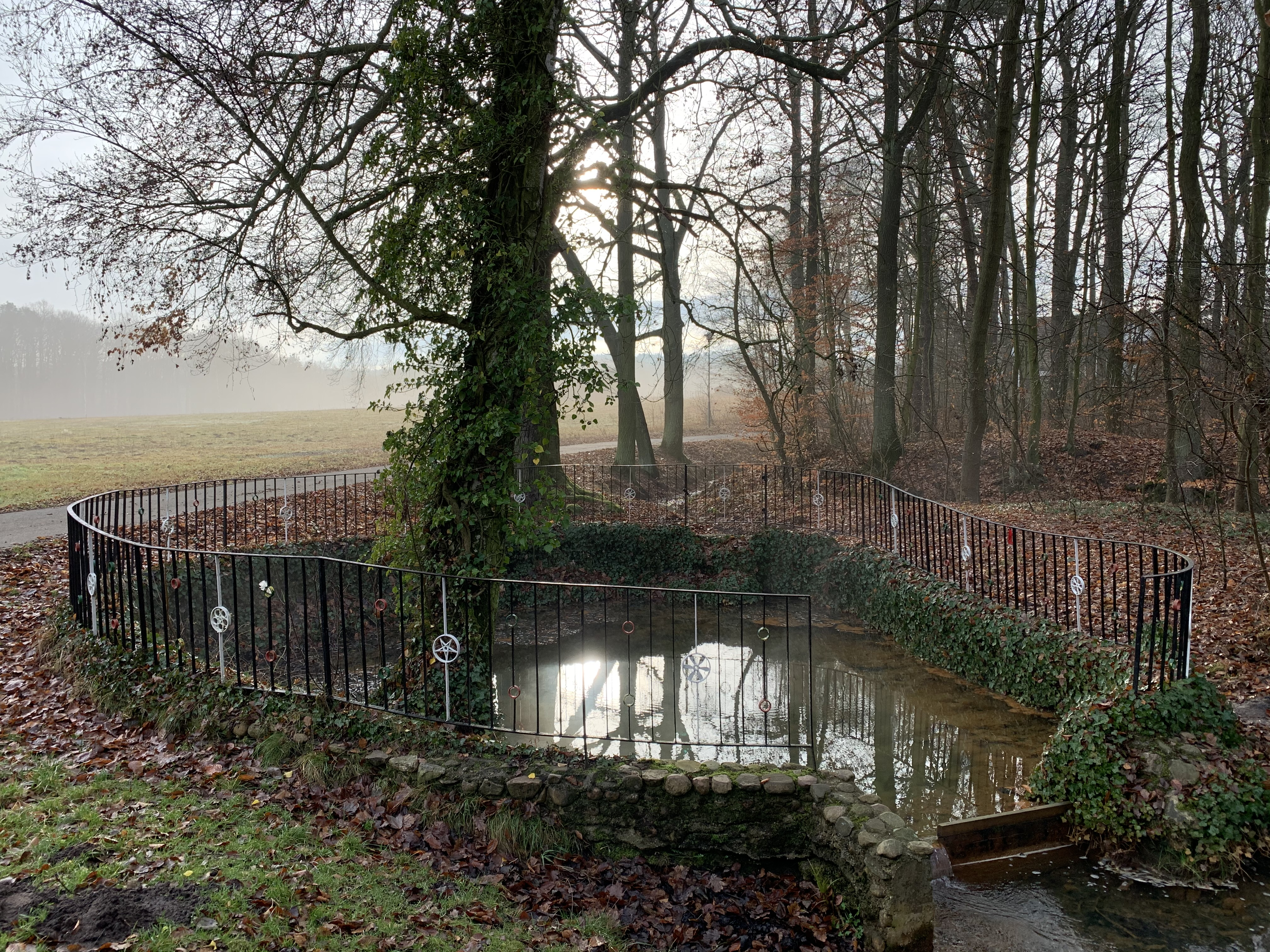 Der Goldborn ist eine Quelle in Werchow, einem Ortsteil der Stadt Calau in Brandenburg. Sein Vorfluter ist das Göritzer Fließ, das in die Spree entwässert.